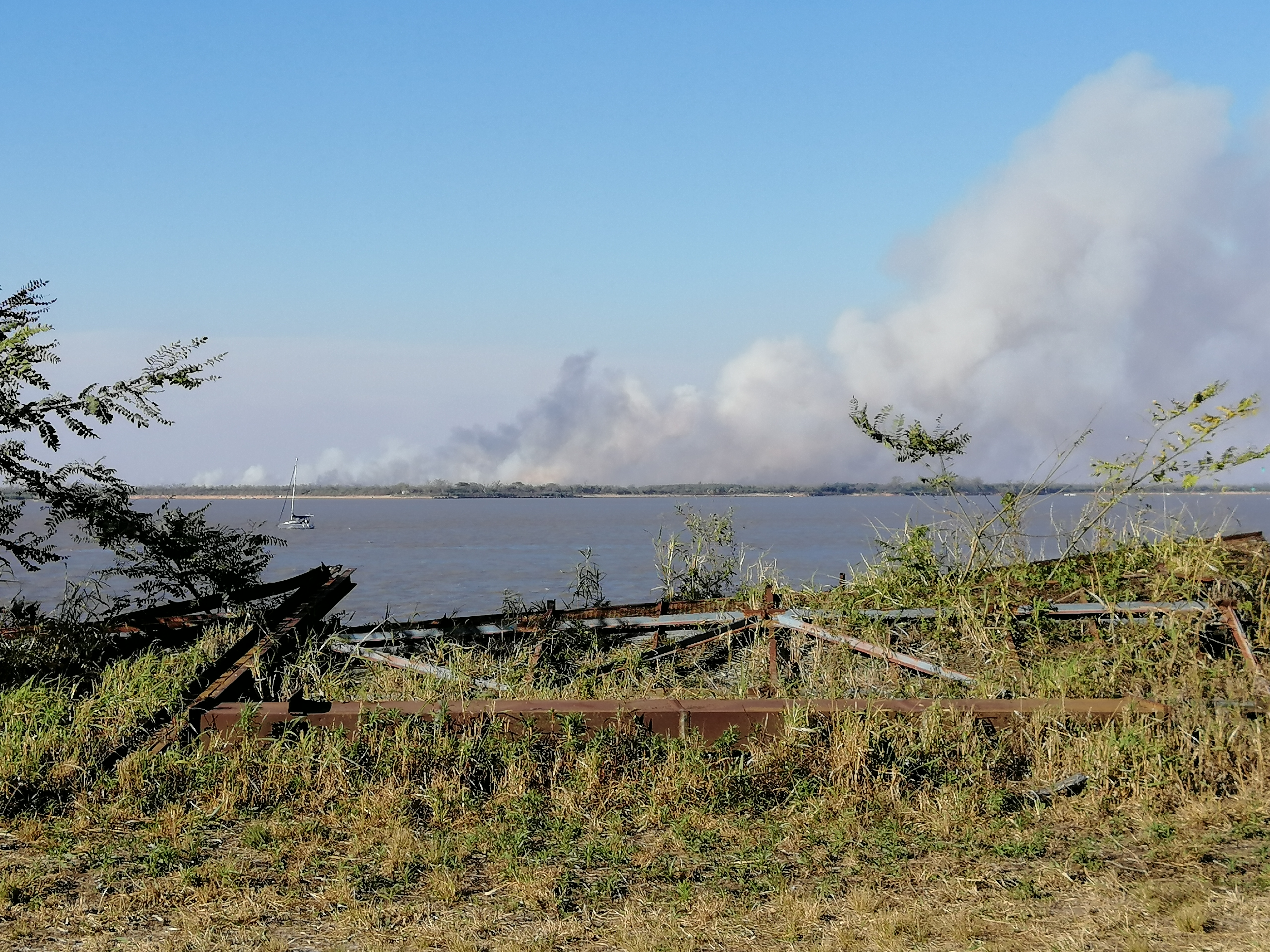 Incendios en las islas del Paraná, visto desde Rosario